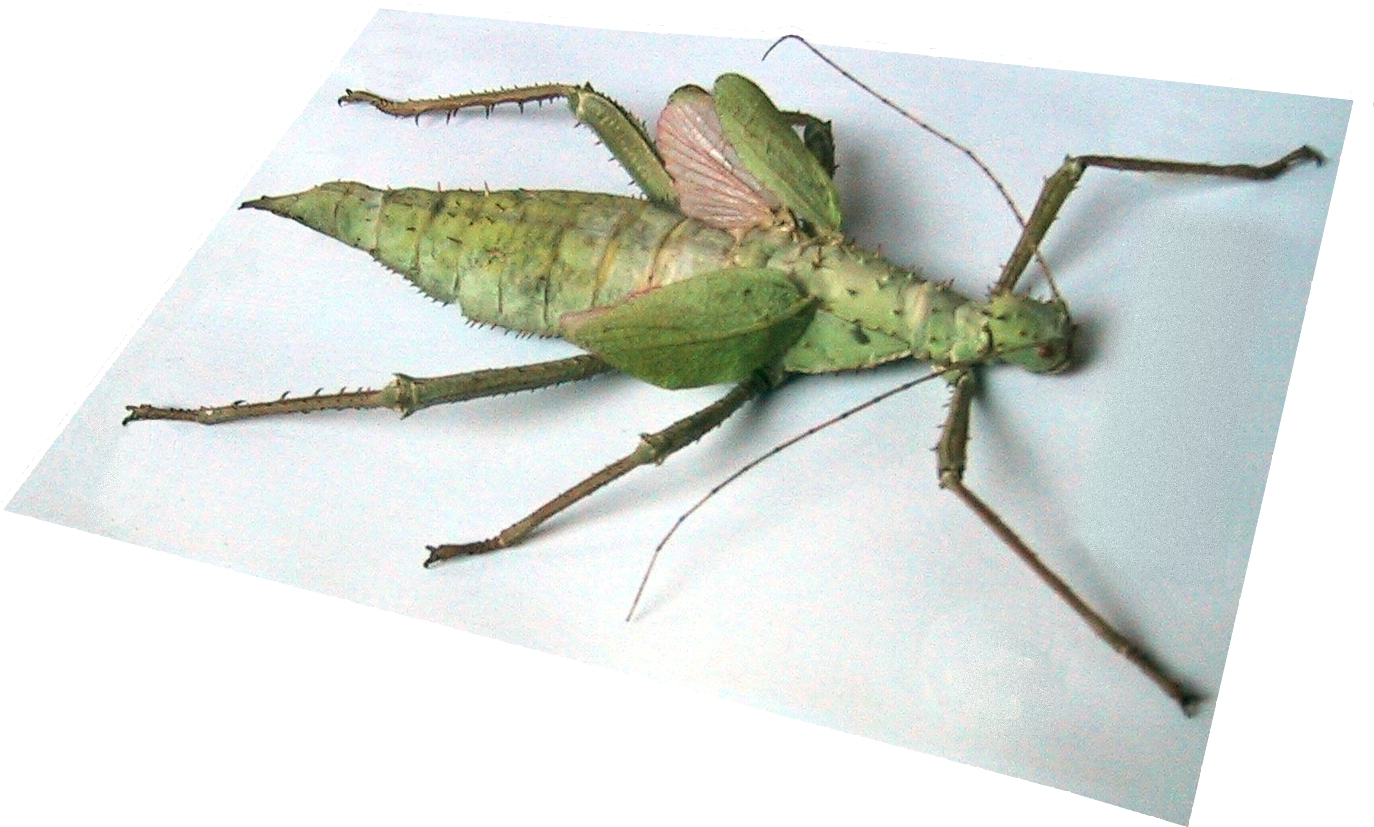 präparierte Heteropteryx dilatata (auch Riesengespenstheuschrecke)